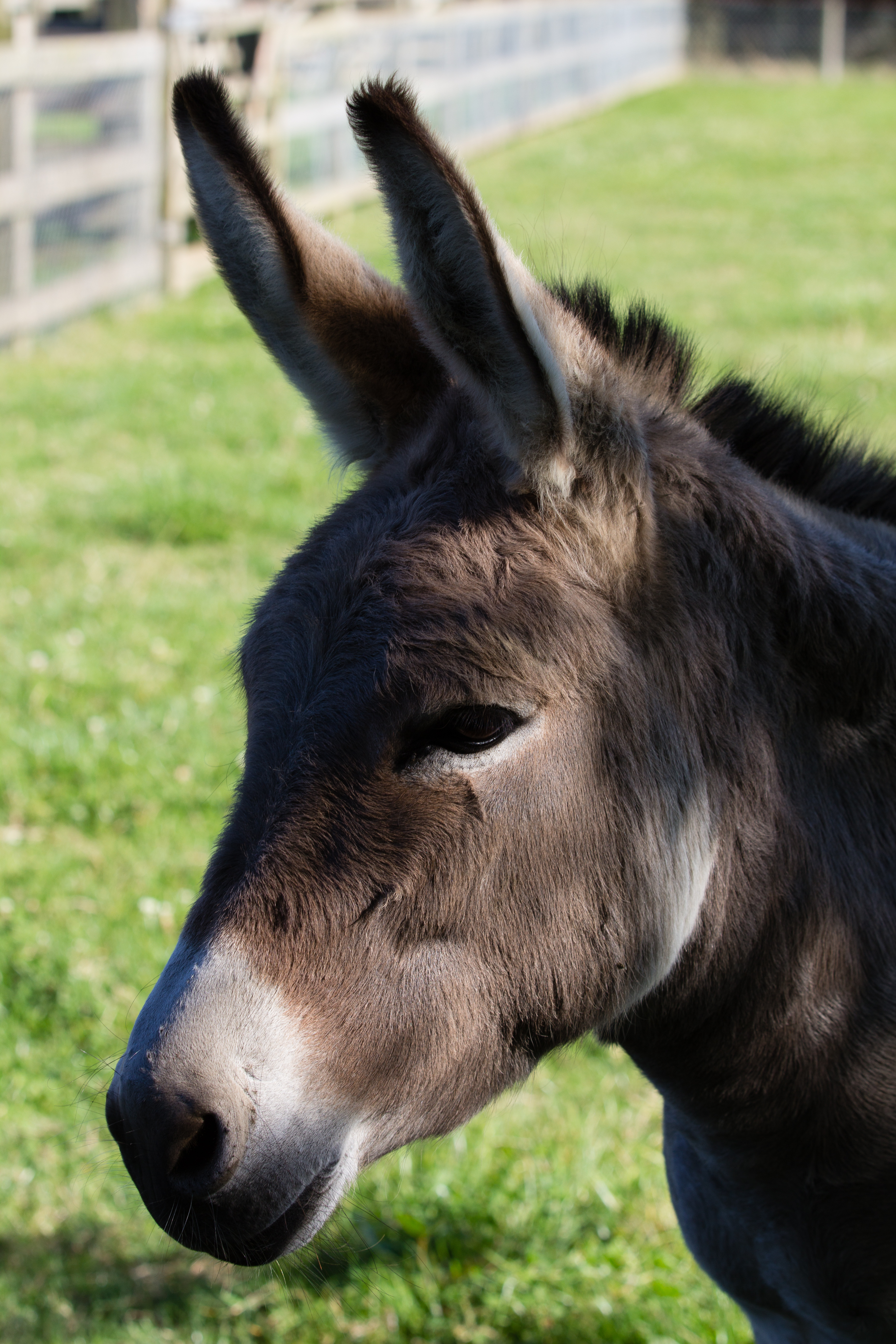 Âne du Cotentin à l'Écomusée du pays de Rennes.